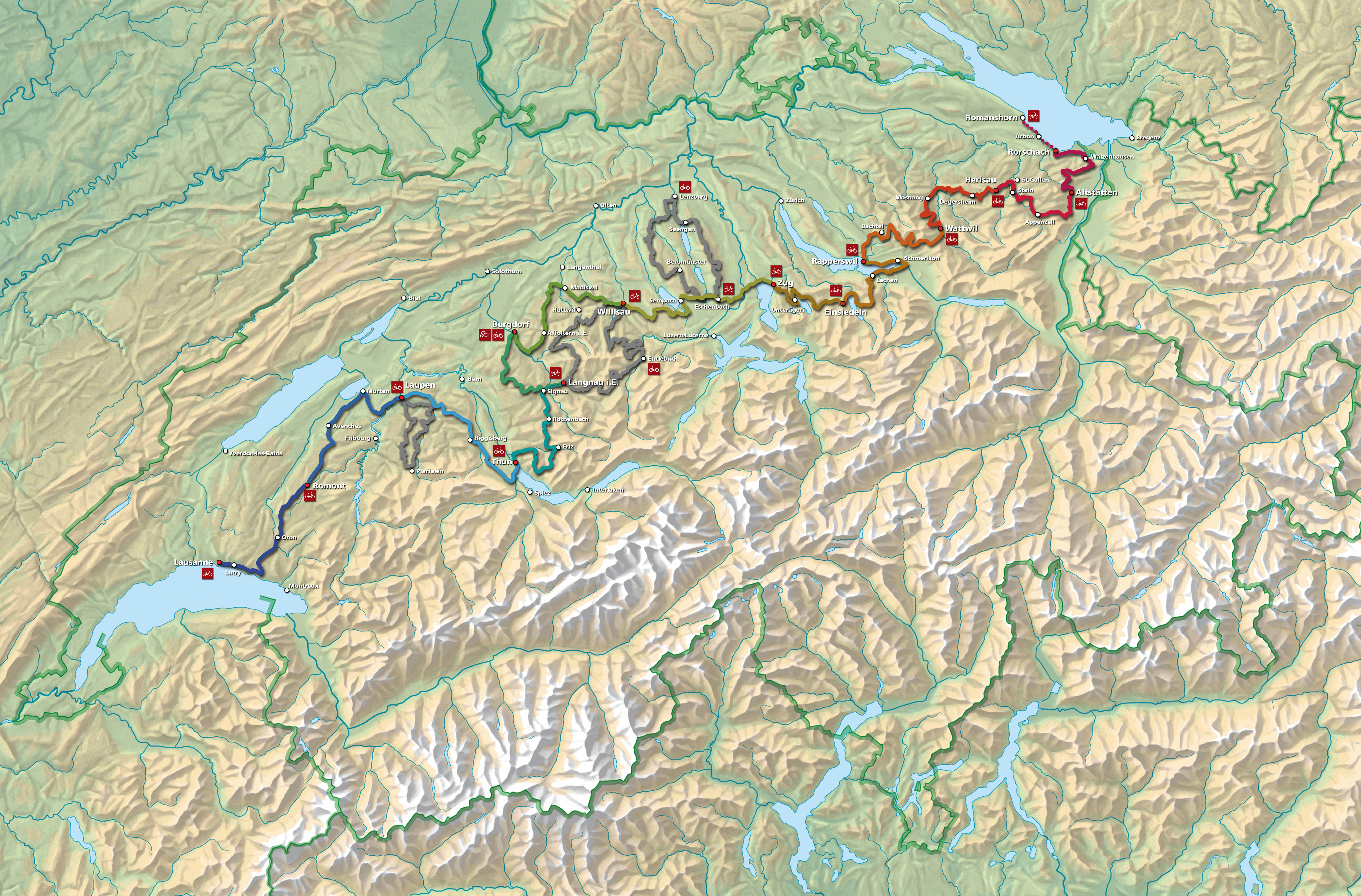 Herzroute (Stand 2019)